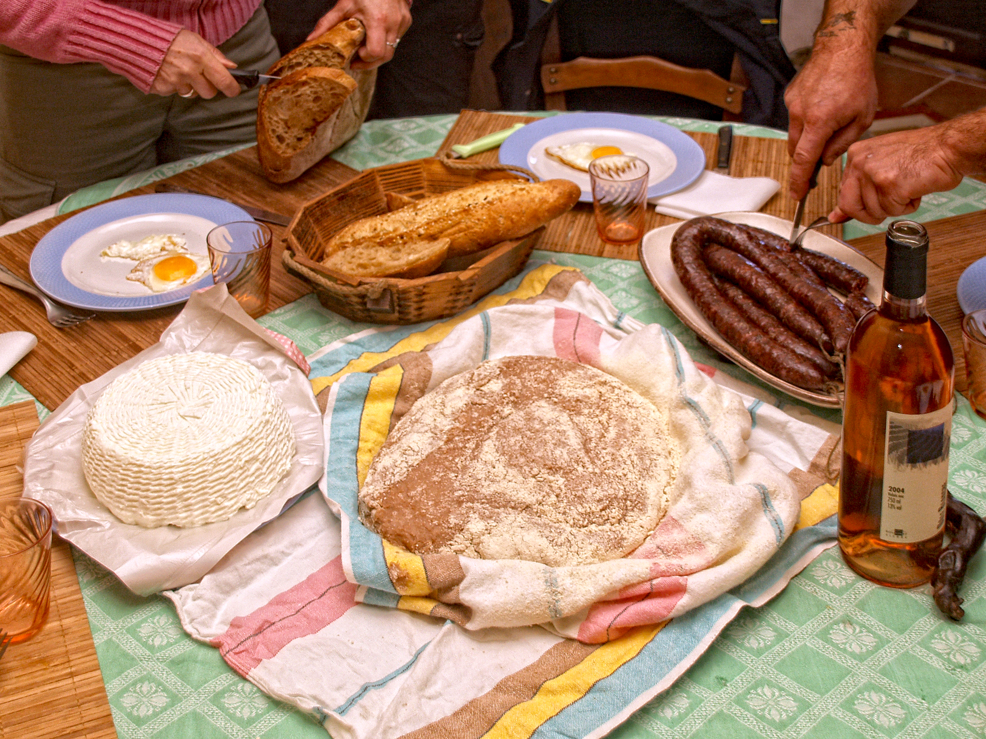 Pulenda - Recette de cuisine corse